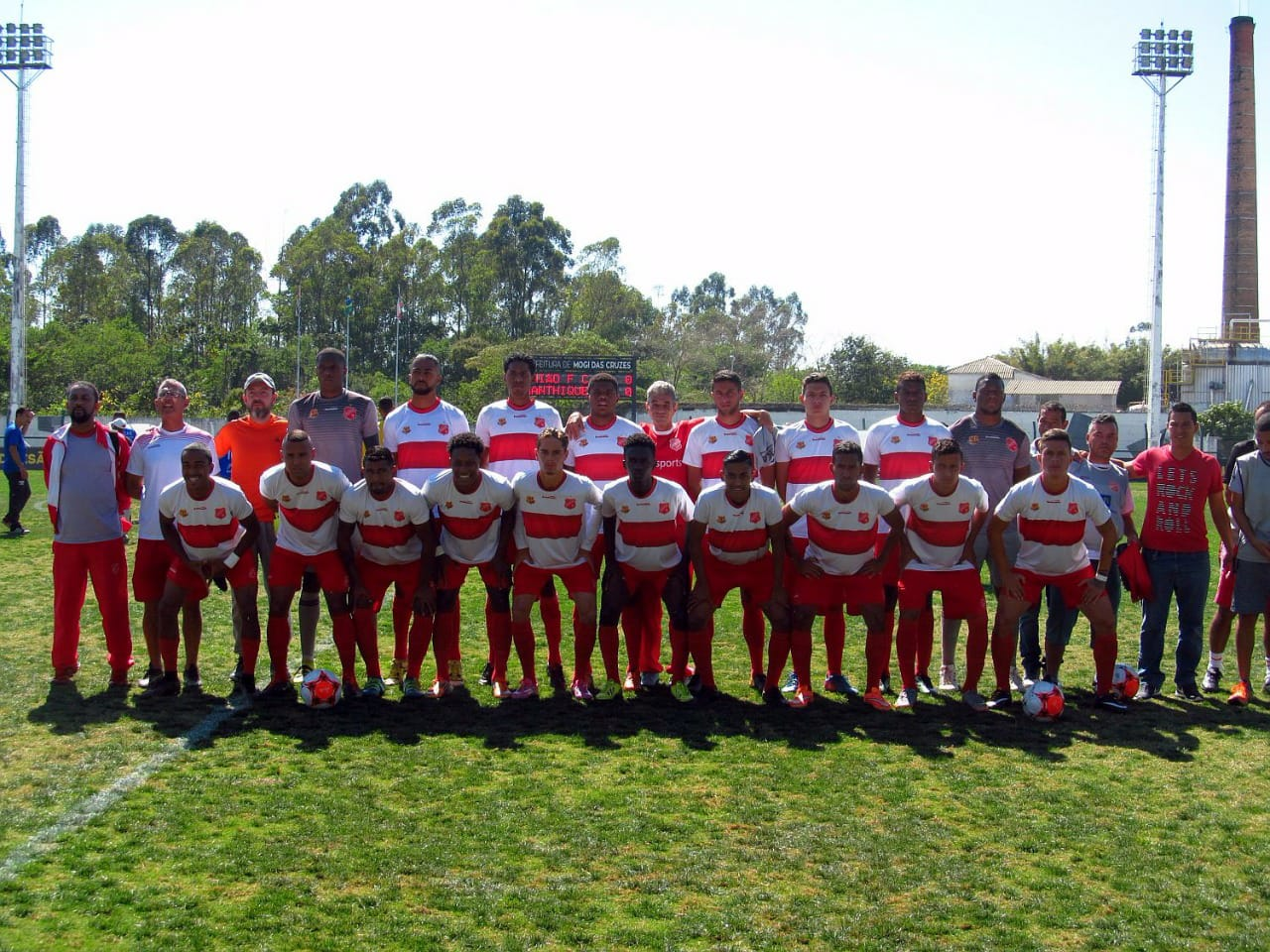 Elenco Unionista de 2017